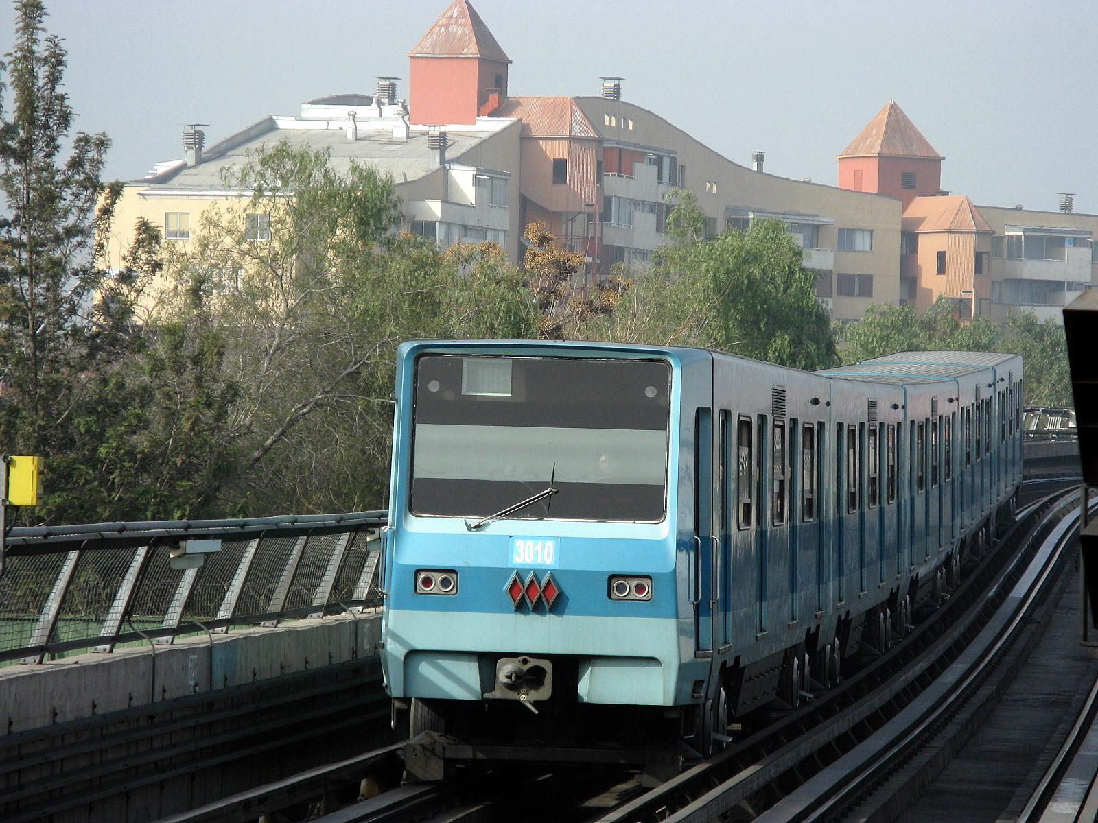 Automotor NS-74 en Línea 5, Metro de Santiago (Chile)